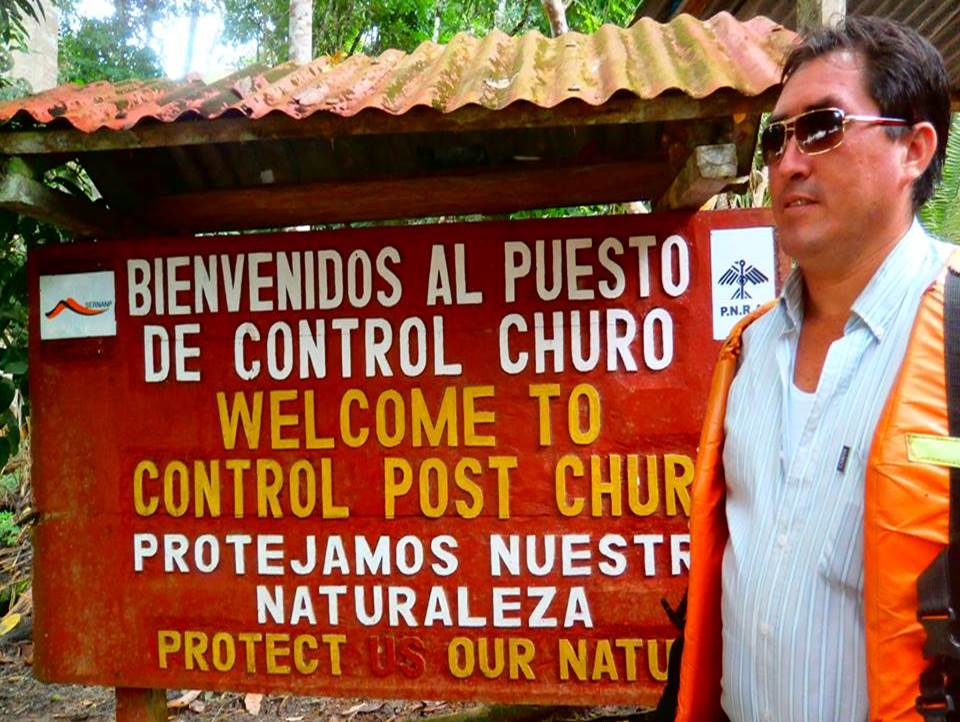 Alcalde Distrital de Huicungo 2015-2018